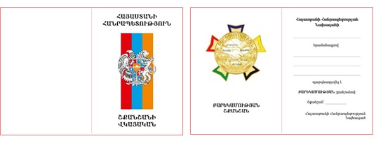 Բարեկամության շքանշանի վկայական